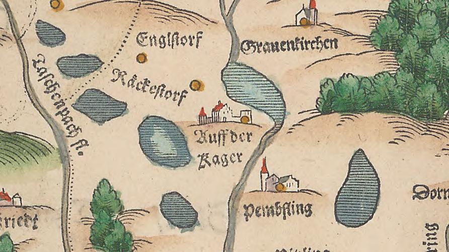 Bairische Landtafeln, vierundzwanzig; sog. Apiankarte von 1568; zeigt in Bayern alle bedeutenden Plätze, die Städte, Edelsitze, Klöster, Flüsse usw.; hier abgebildet ist ein Ausschnitt insbesondere vom Edelsitz Kager